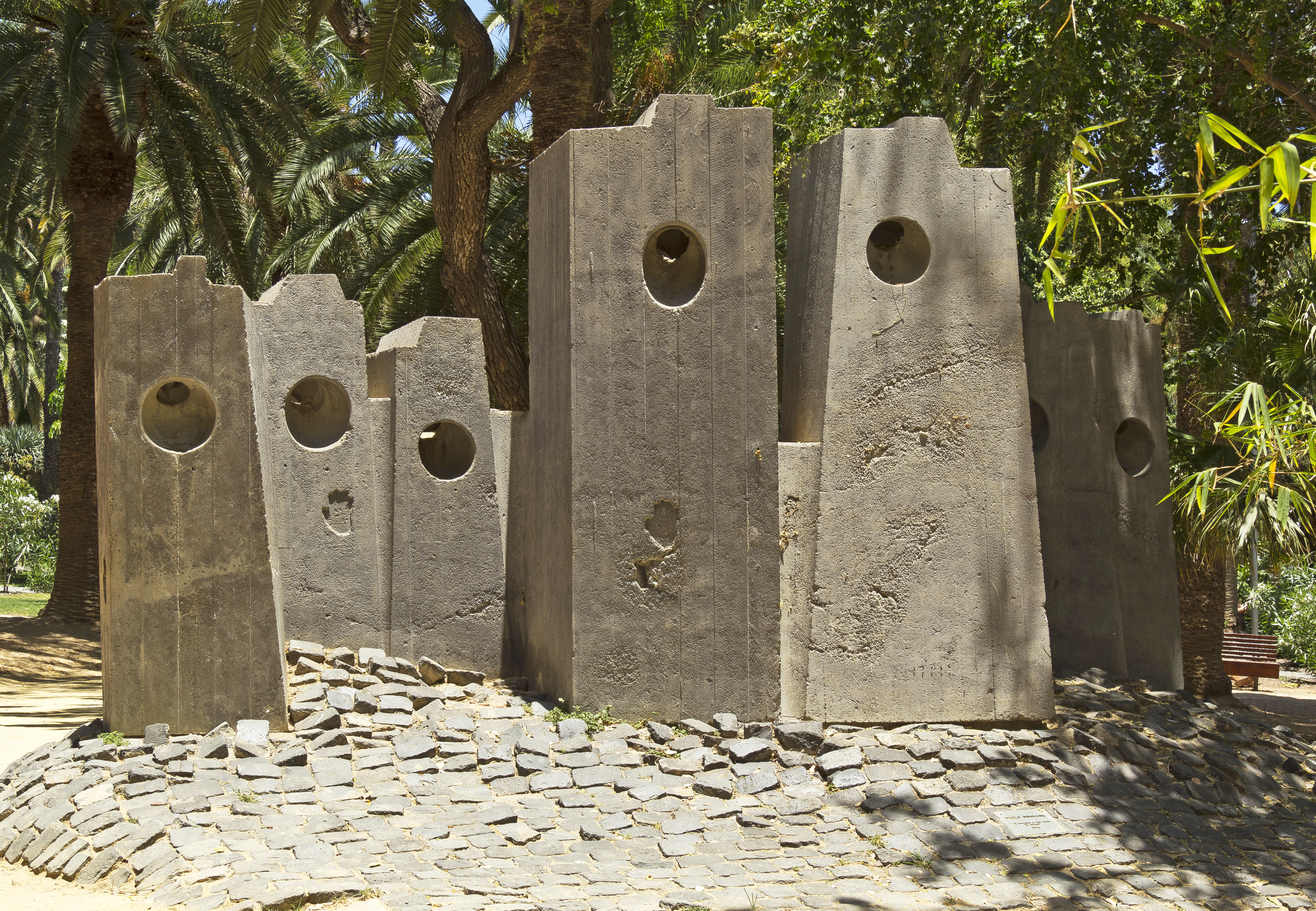 Die Plastik Homenaje a las Islas Canarias des 1910 in Crivillén (Teruel) geborenen und 1985 in Madrid gestorbenen Künstlers Pablo Serrano befindet sich im Parque García Sanabria in Santa Cruz de Tenerife. Das Werk wurde 1973 im Rahmen der „Exposición Internacional de Escultura en la Calle“ der Architektenkammer der Kanarischen Inseln aufgestellt. Die Maße sind 2,90 x 5,80 x 2,40 m.